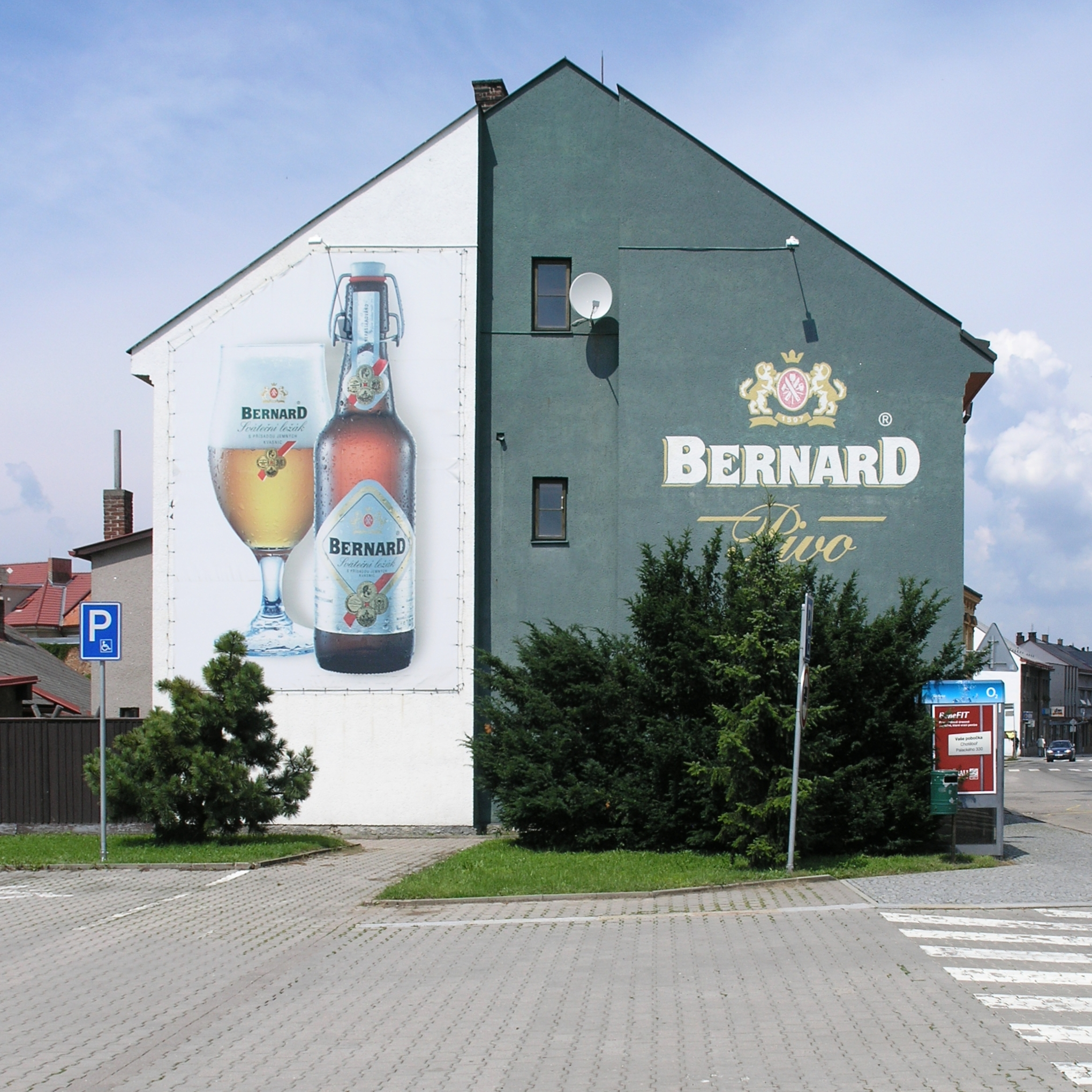 Česky: Chotěboř, fasáda domu s reklamou pivovaru Bernard.